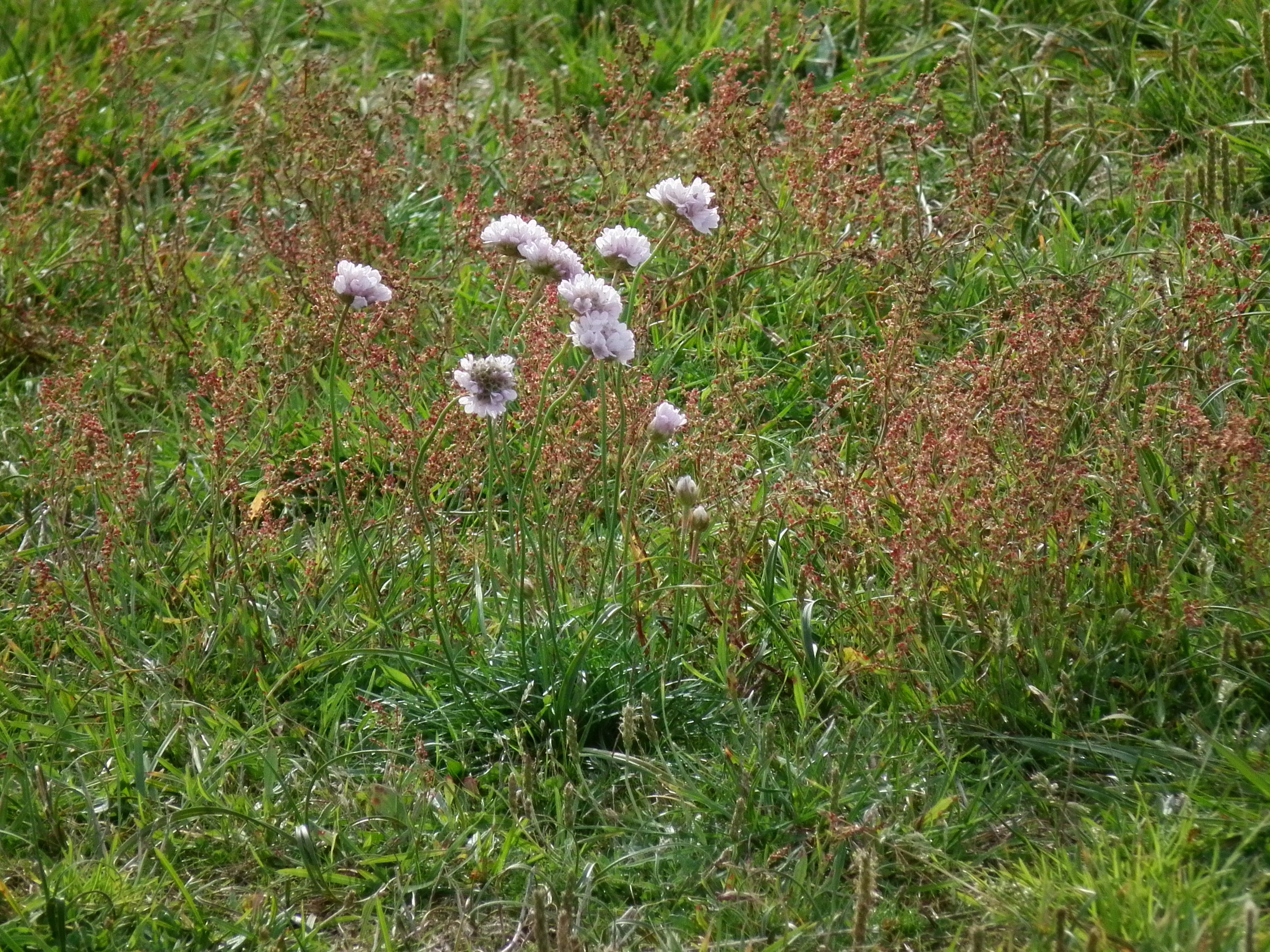 Strand-Grasnelke (Armeria maritima) auf der ostfriesischen Nordseeinsel Juist (Niedersachsen, Deutschland)